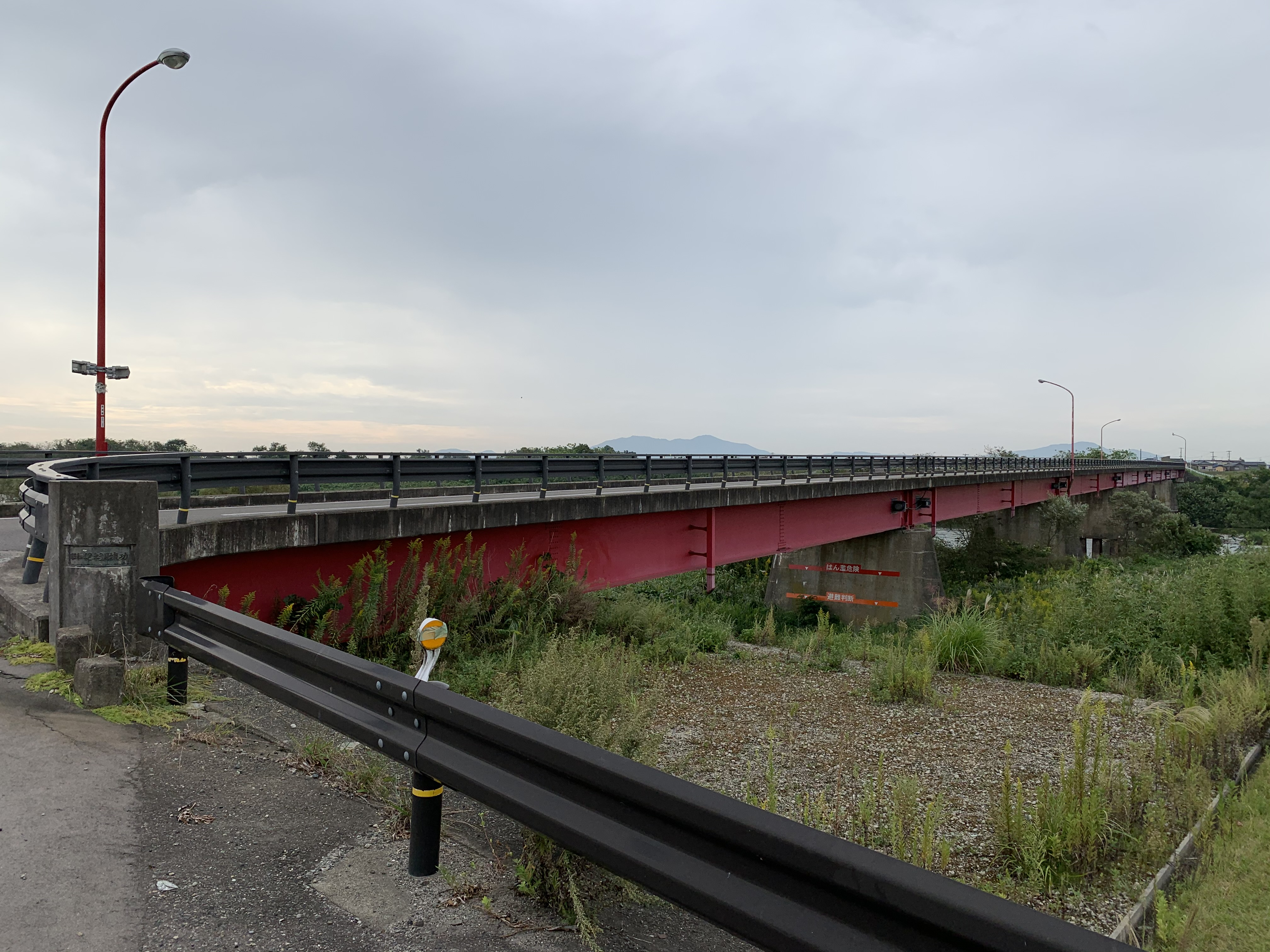 信濃川にかかる庄瀬橋（右岸から撮影）